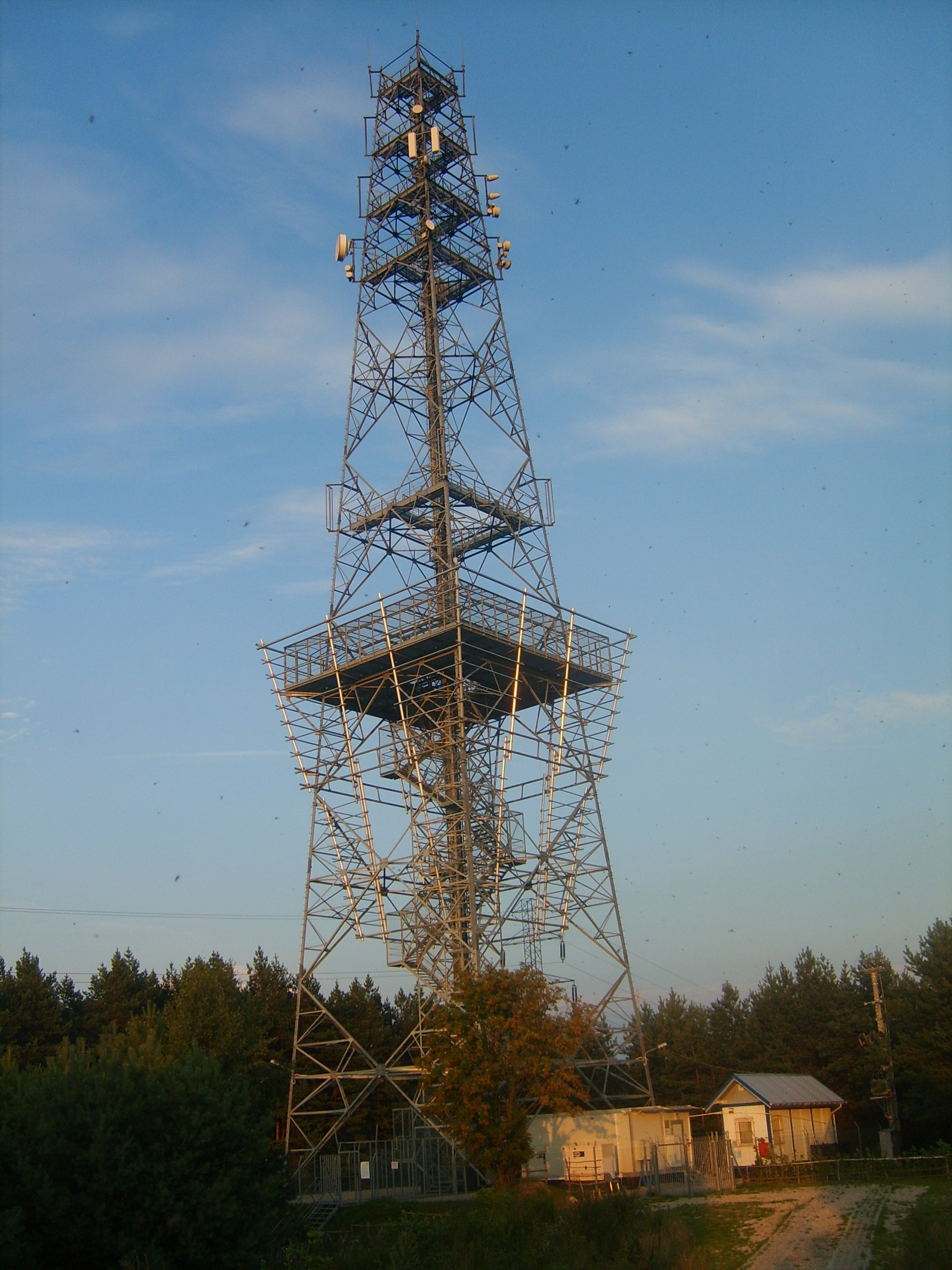 Góra Donas, wieża na szczycie góry.